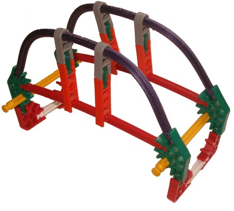 Un pont fait avec des K'nex.